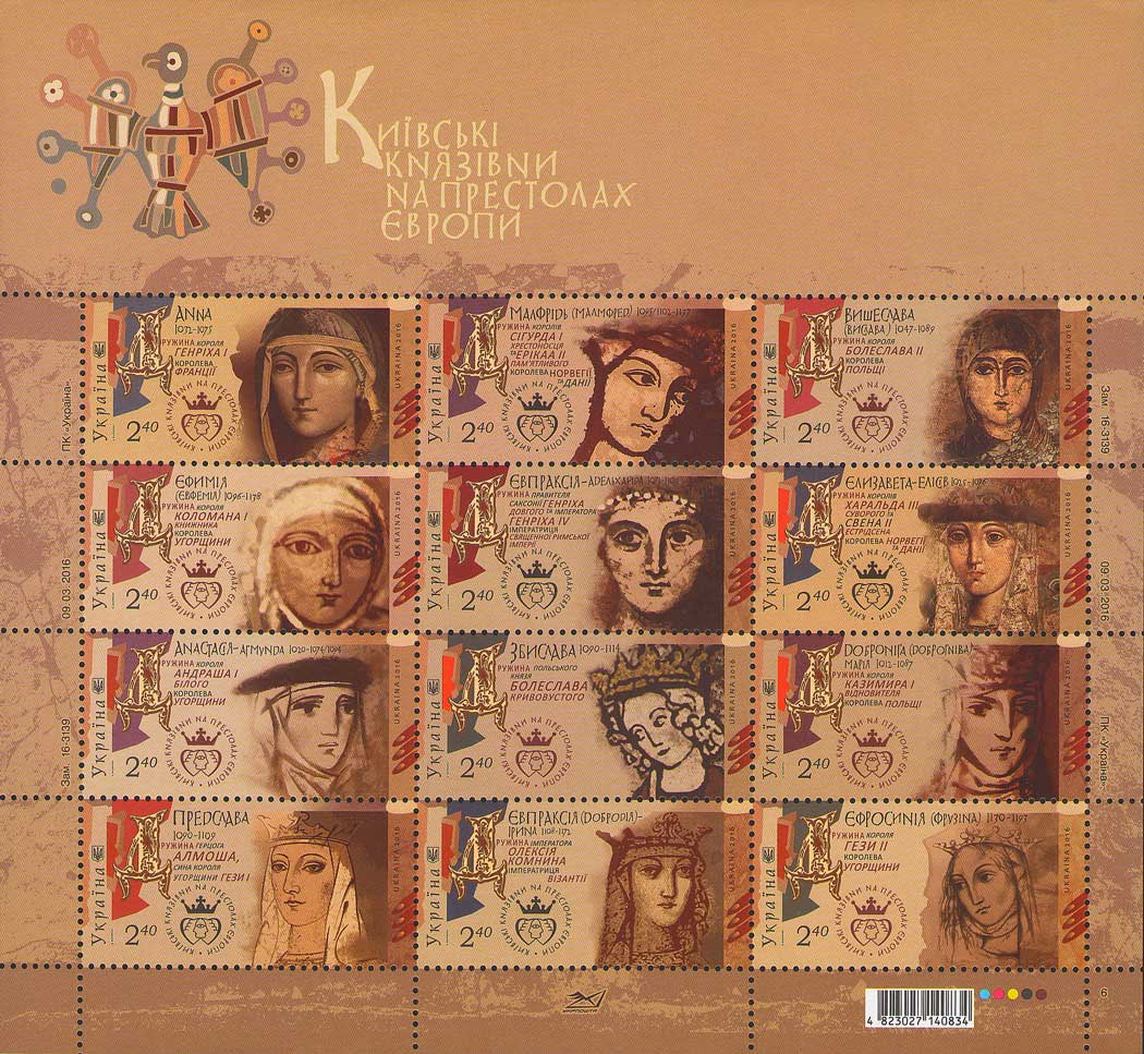 Марковий аркуш «Київські князівни на престолах Європи» «Анна. 1032—1075» «Малфрідь (Малмфред). 1095/1102-1137» «Вишеслава (Вислава). 1047—1089» «Єфимія (Євфемія). 1096—1138» «Євпраксія—Адельхайра. 1071—1109» «Єлизавета—Елісів. 1025—1076» «Анастасія—Агмунда. 1020—1074/1094» «Збислава. 1090—1114» «Доброніга (Доброгніва)—Марія. 1012—1087» «Предслава. 1090—1109» «Євпраксія (Добродія)—Ірина. 1108—1172» «Єфросинія (Фрузіна). 1130—1193»